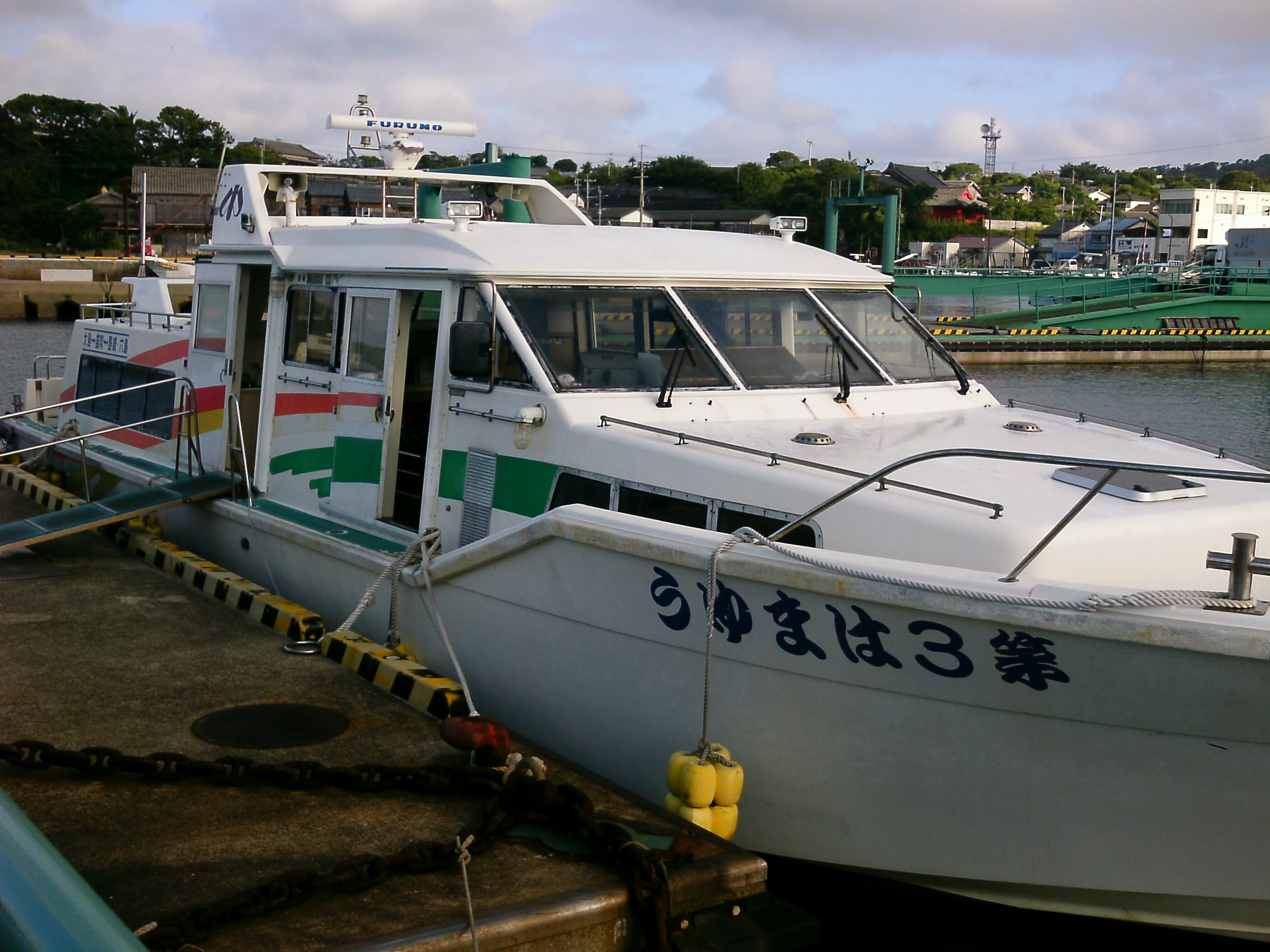 小値賀町営船（野崎島行はまゆう）